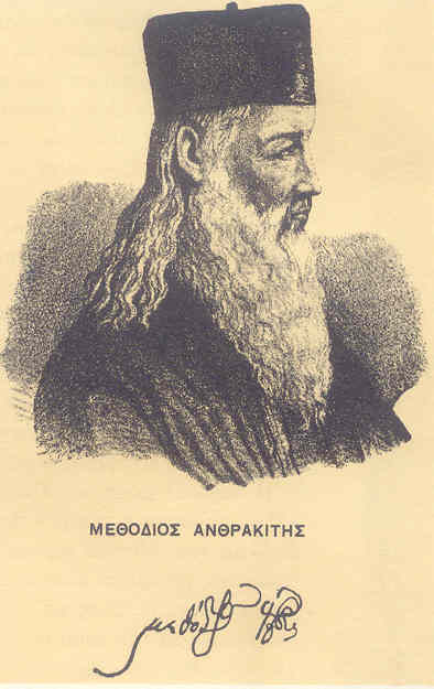 Logios Methodios Anthrakites